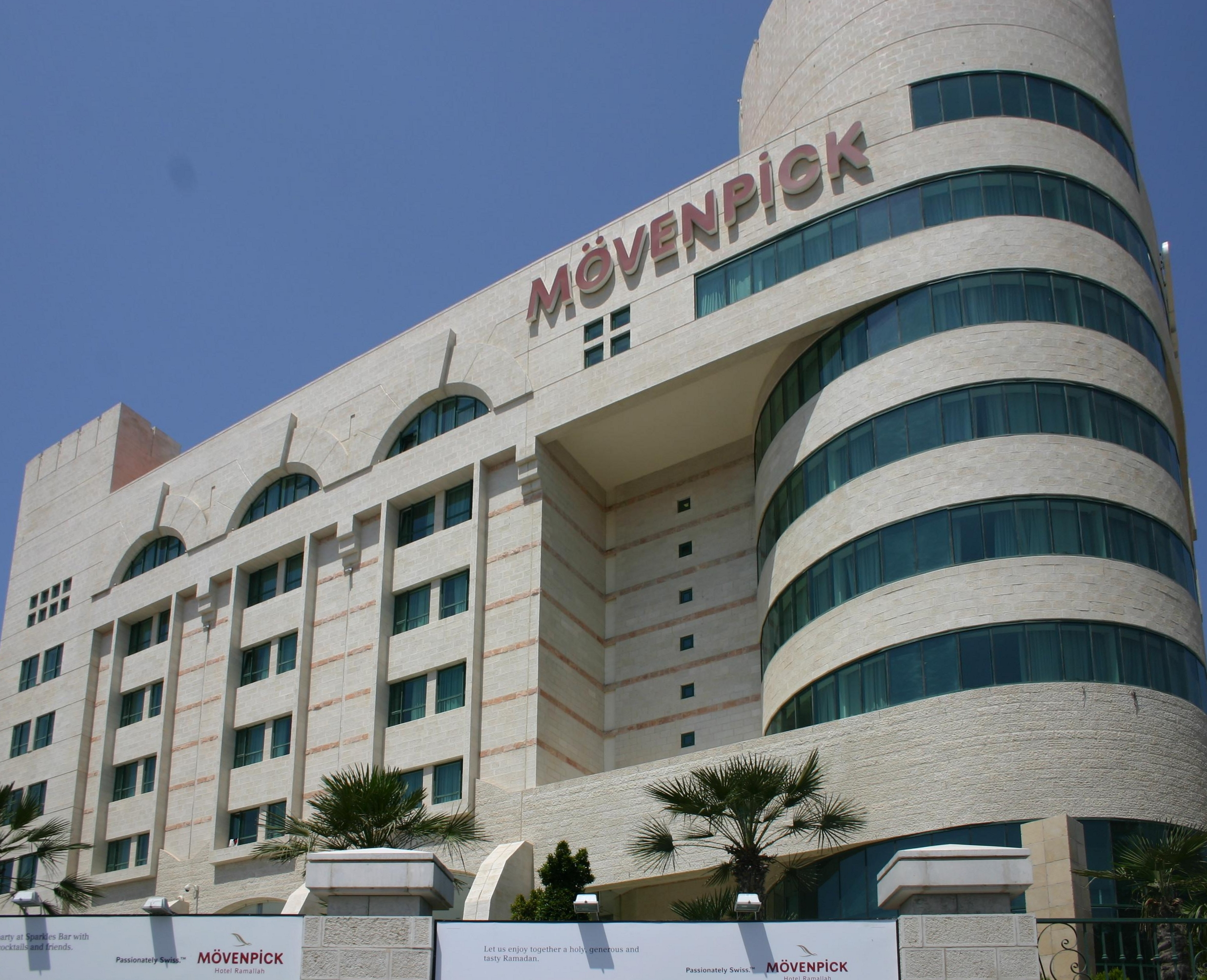 Hotel Mövenpick in Ramallah